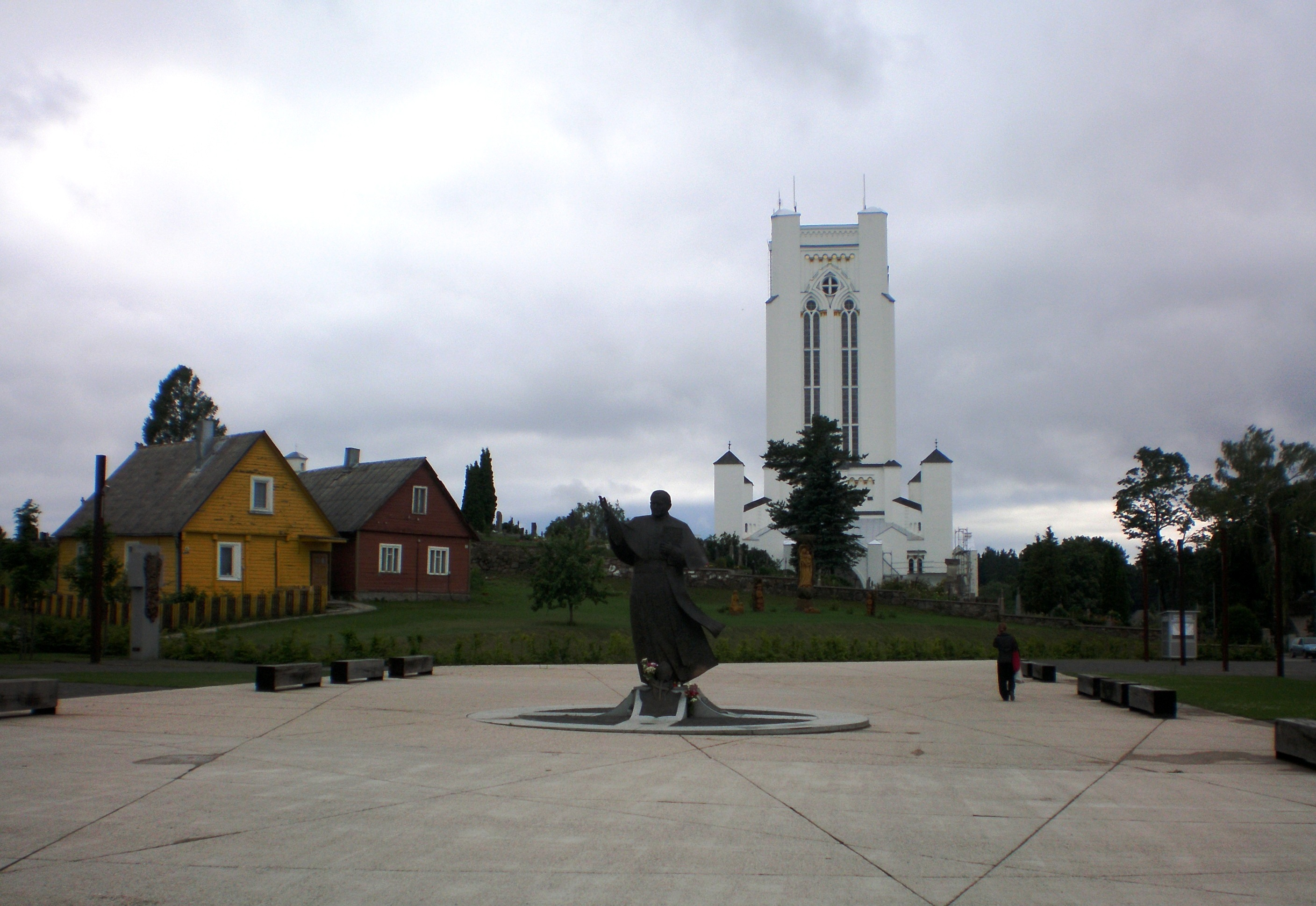 Paminklas Jonui Pauliui II, Šiluva, Raseinių raj.